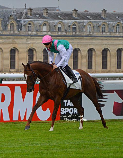 New bay